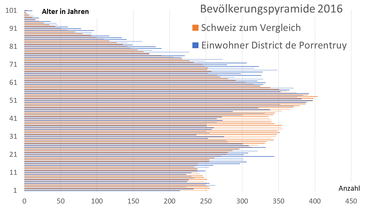 Altersaufbau der Bevölkerung im District de Porrentruy